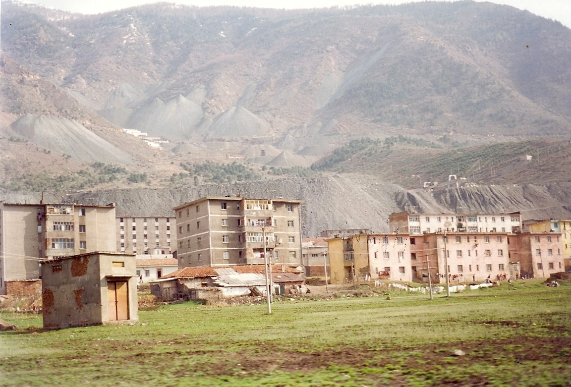 Bulqiza, town in Albania Bulqiza, by i Albania